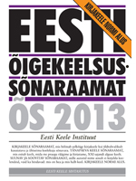 Eesti õigekeelsussõnaraamat ÕS 2013